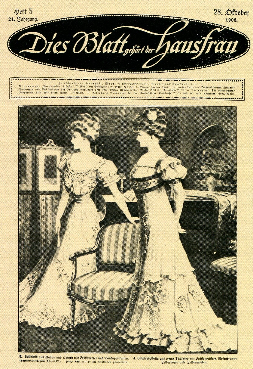 Titelblatt der Zeitschrift Dies Blatt gehört der Hausfrau 1906